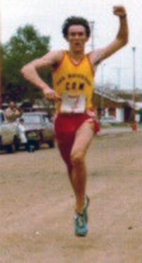 Luis Migueles running in San Salvador, Entre Ríos.